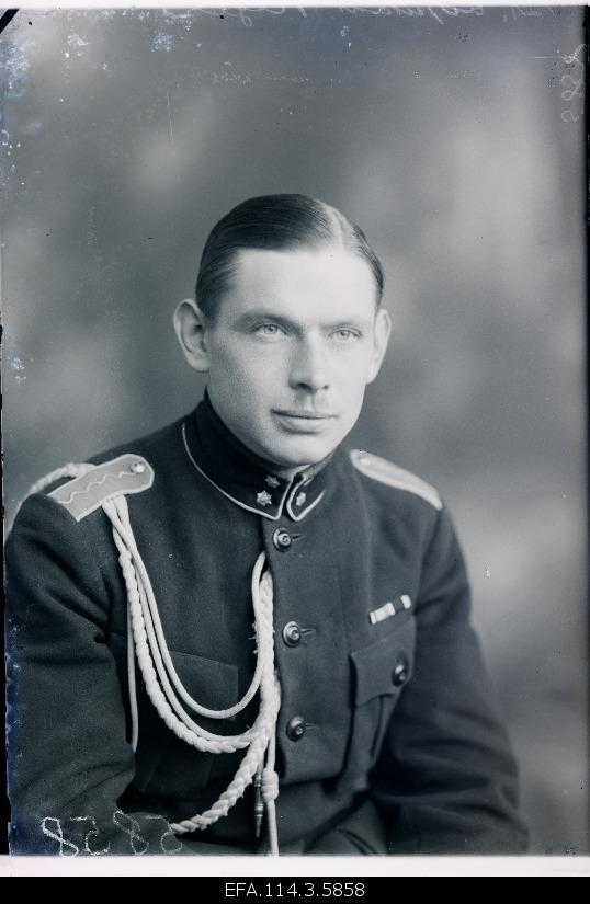 Soomusrongide Diviisi operatiivadjutant leitnant Aleksander Tilger.